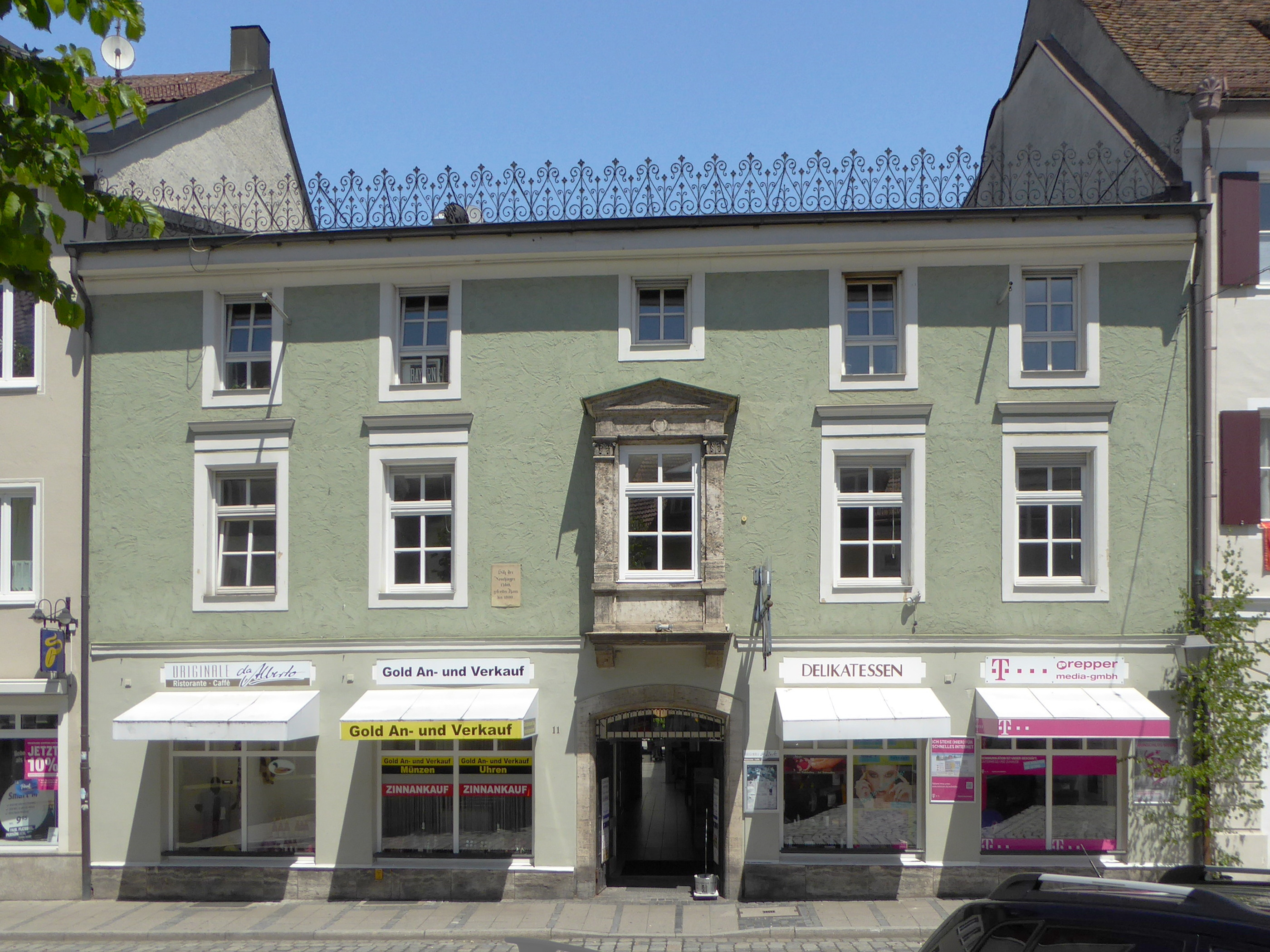 Weilheim in Oberbayern, Admiral-Hipper-Straße 11 (Neuchingerhaus).